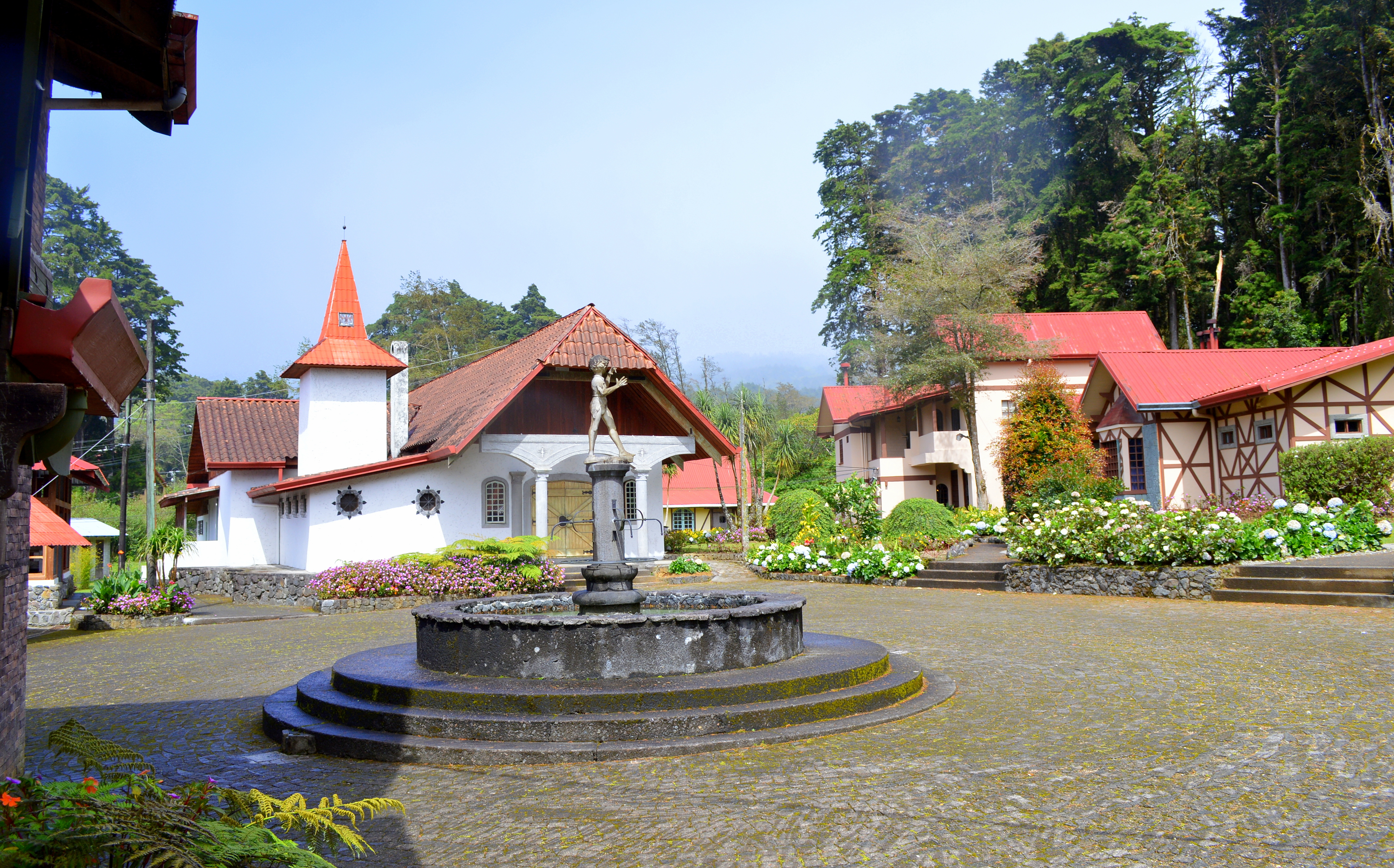 El Tirol en San Radael de Heredia